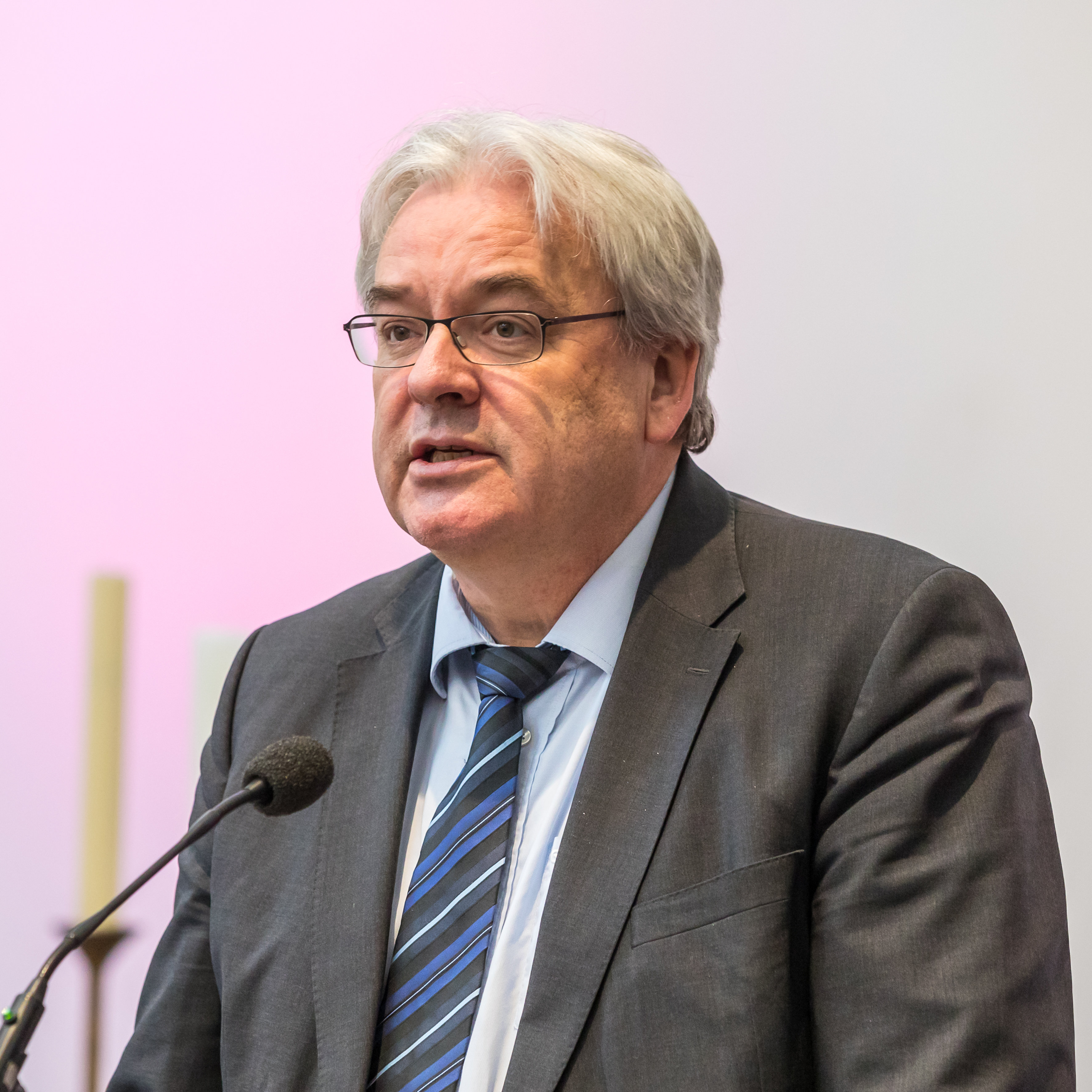 Ausstellungseröffnung „ParallelUNIversum?! Köln und seine Universität seit 1919“ des Historischen Archivs der Stadt Köln. Eröffnungsort: Trinitatiskirche. Ausstellungsort: Heumarkt 14, Köln Foto: Grußwort durch Prof. Dr. Dr. h.c. Axel Freimuth, Rektor der Universität zu Köln